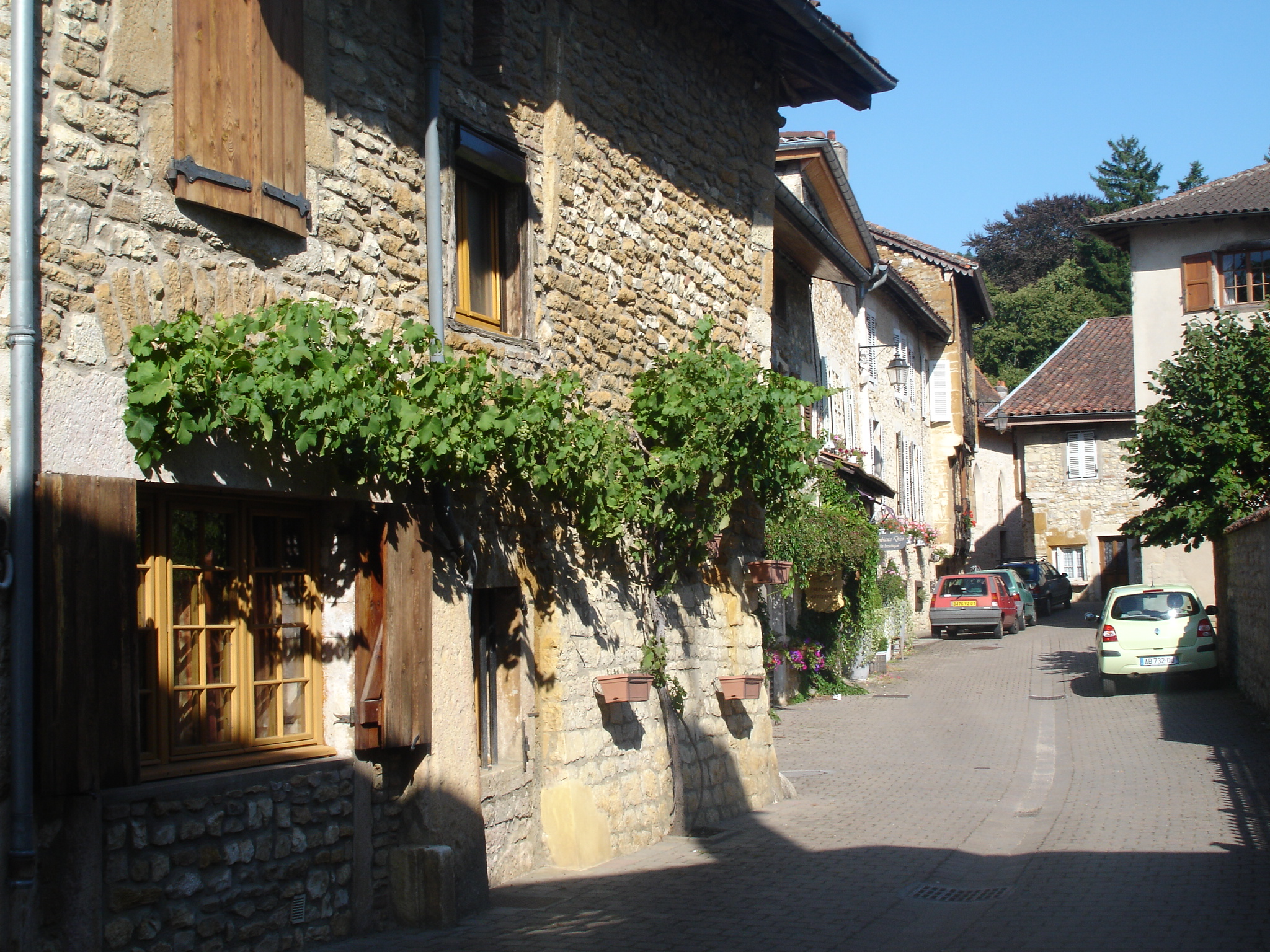 Meillonnas (Ain) : rue du centre allant vers l'église